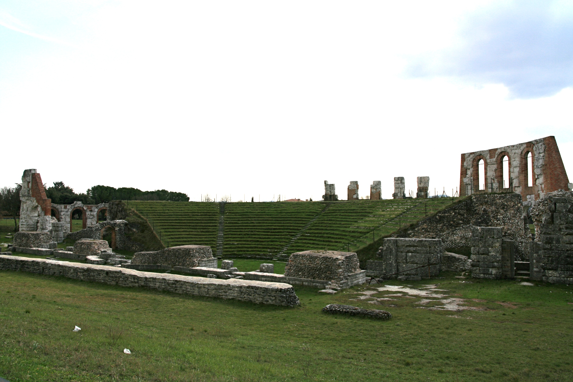 Teatro Romano - MIBAC This is a photo of a monument which is part of cultural heritage of Italy.